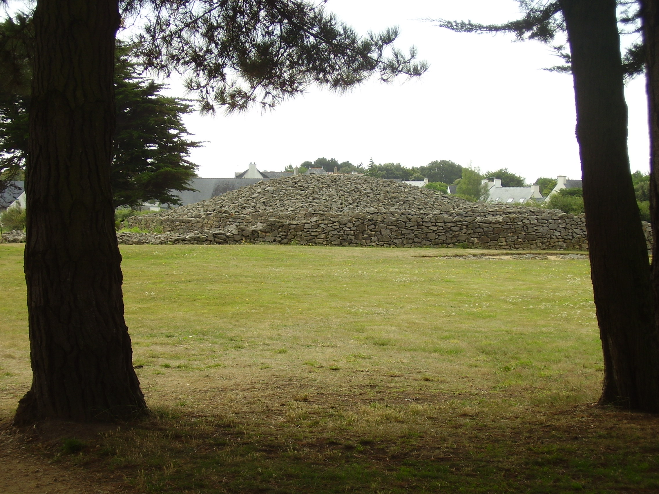 Locmariaquer, Frankreich